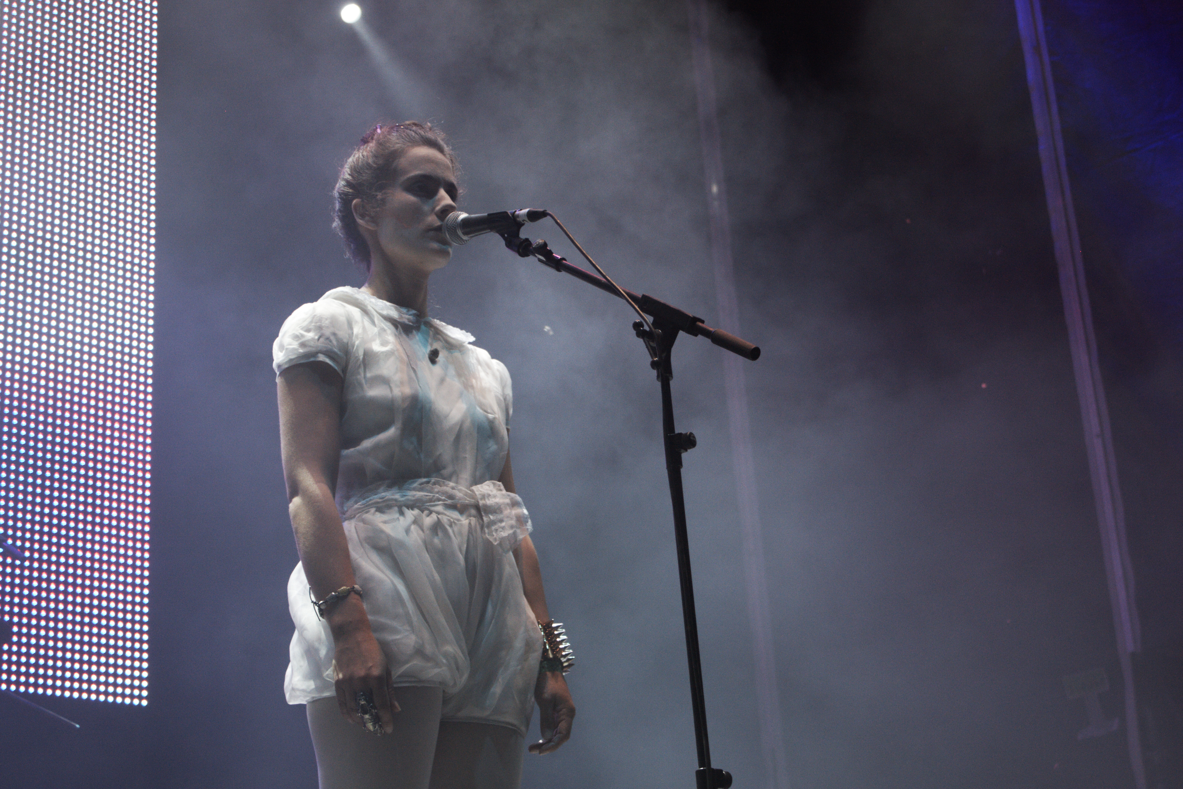 Ariadna (Los Punsetes) en el Contempopranea 2010. Alburquerque (Badajoz) 24/07/2010